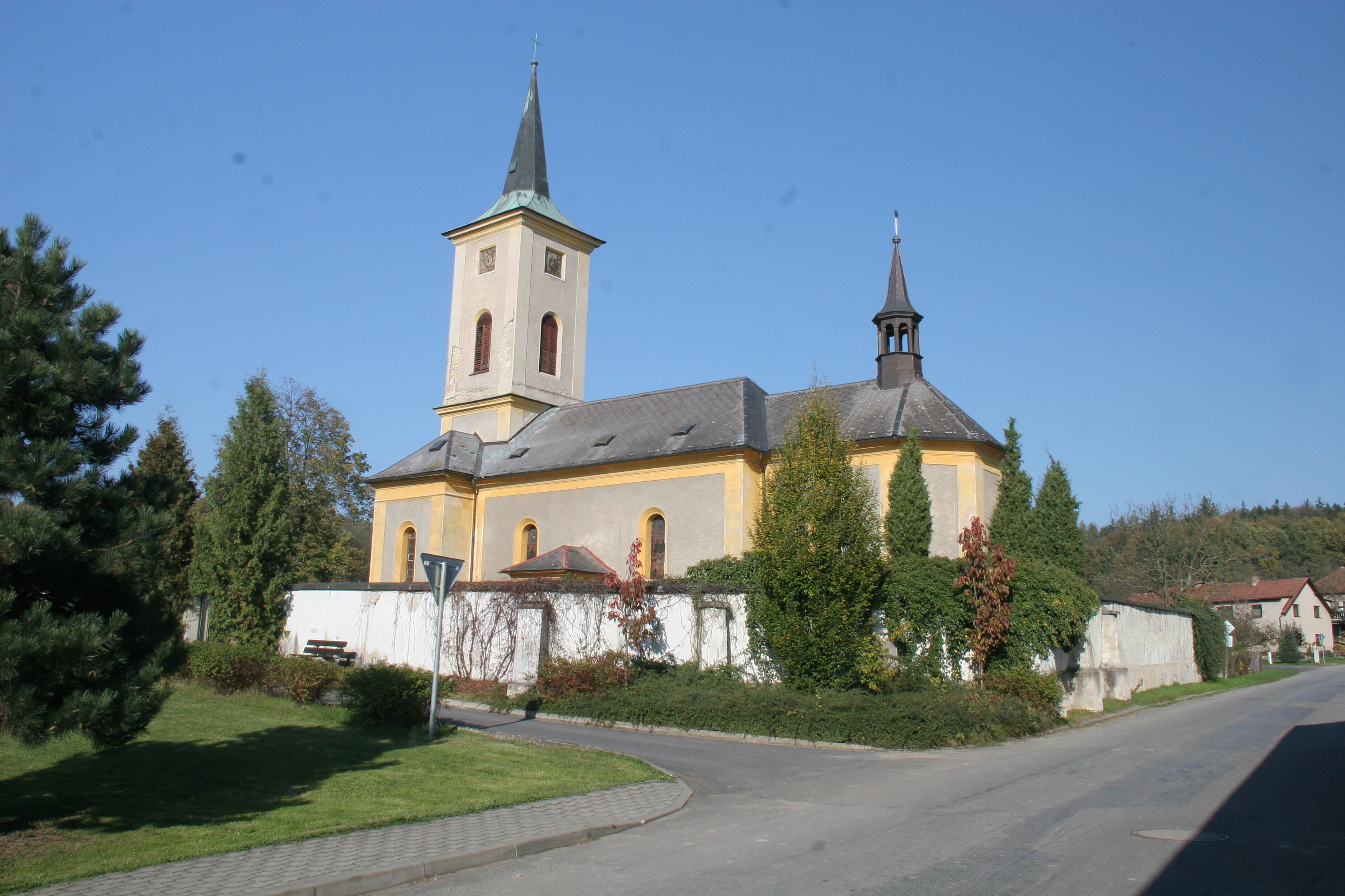 Sruby kostel